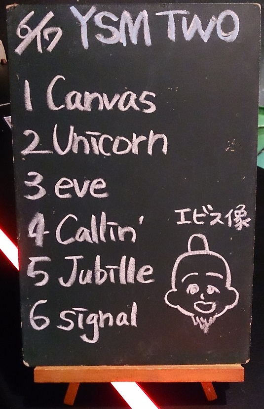 amiinAセトリボード(20180617(1))